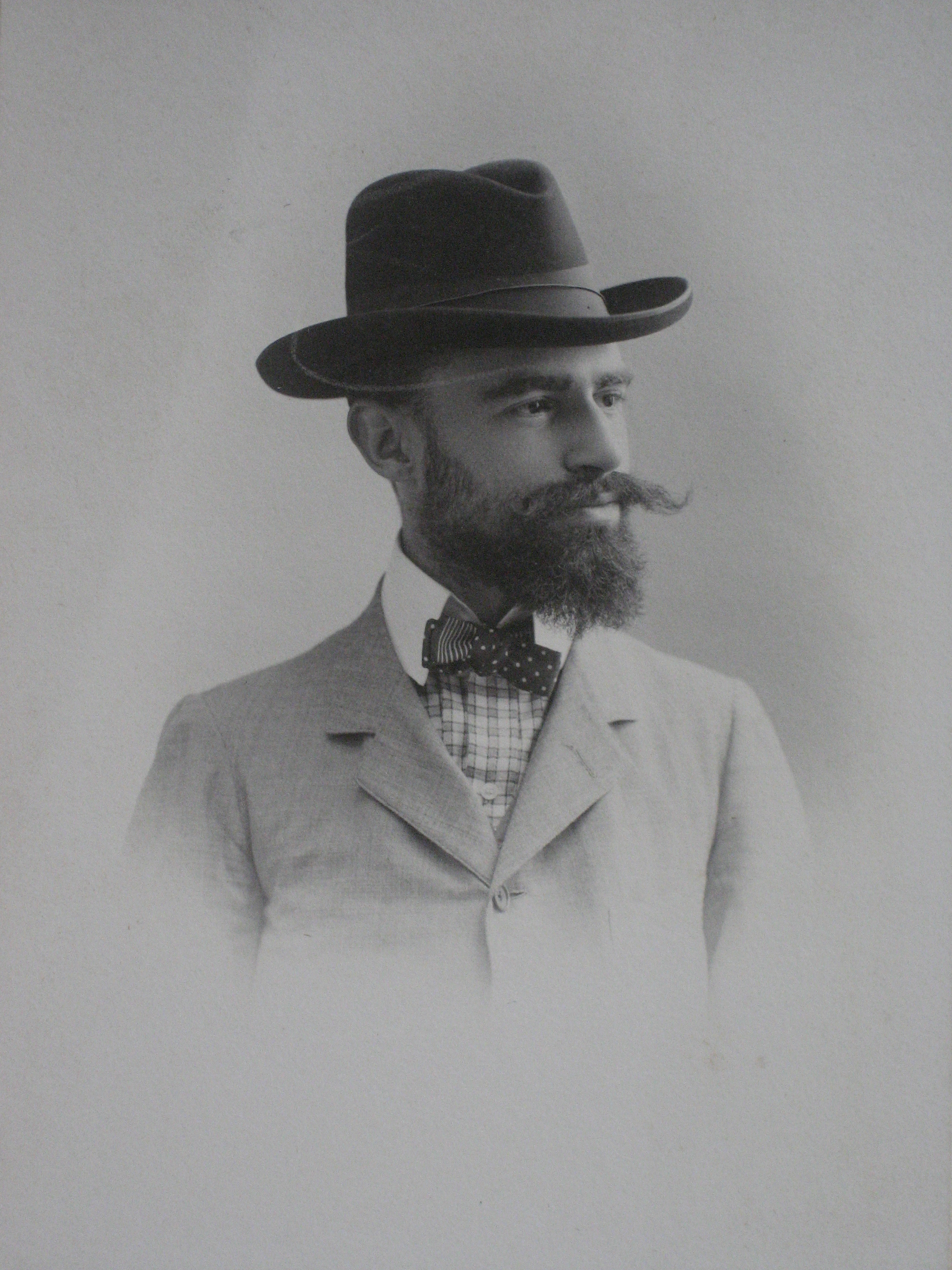 ritratto di Angiolo Orvieto circa 1900